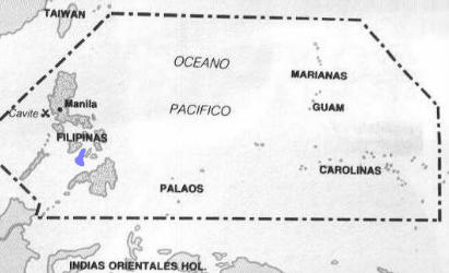 Localización de la Isla de Negros dentro de la Capitanía General de las Filipinas